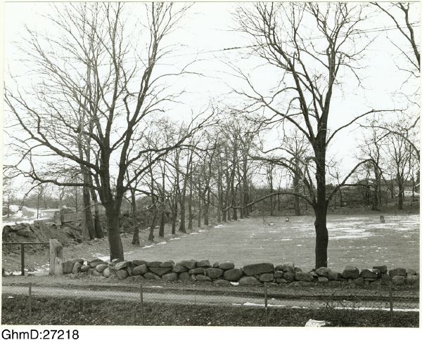 Kyrkelyckan, kolerakyrkogård i Bräcke.